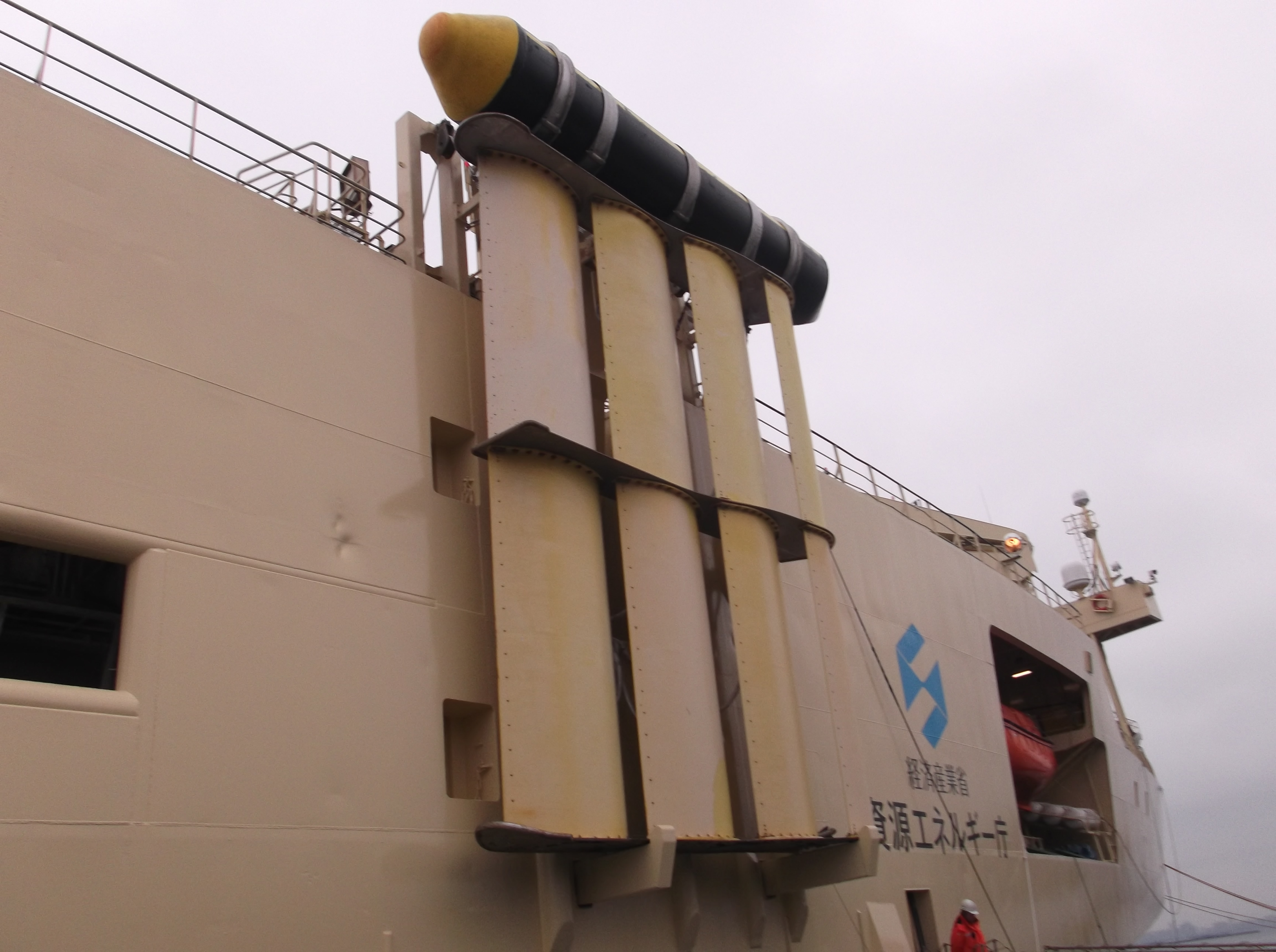 独立行政法人石油夕天然ガス・金属鉱物資源機構の調査船資源（しげん）のパラベイン、千葉県船橋市の船橋港で撮影